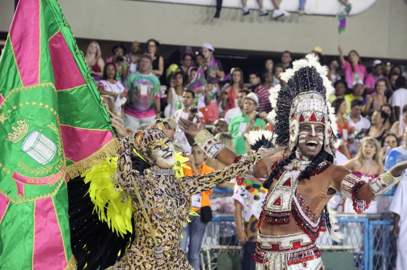 GRES Estação Primeira de Mangueira, 2012.